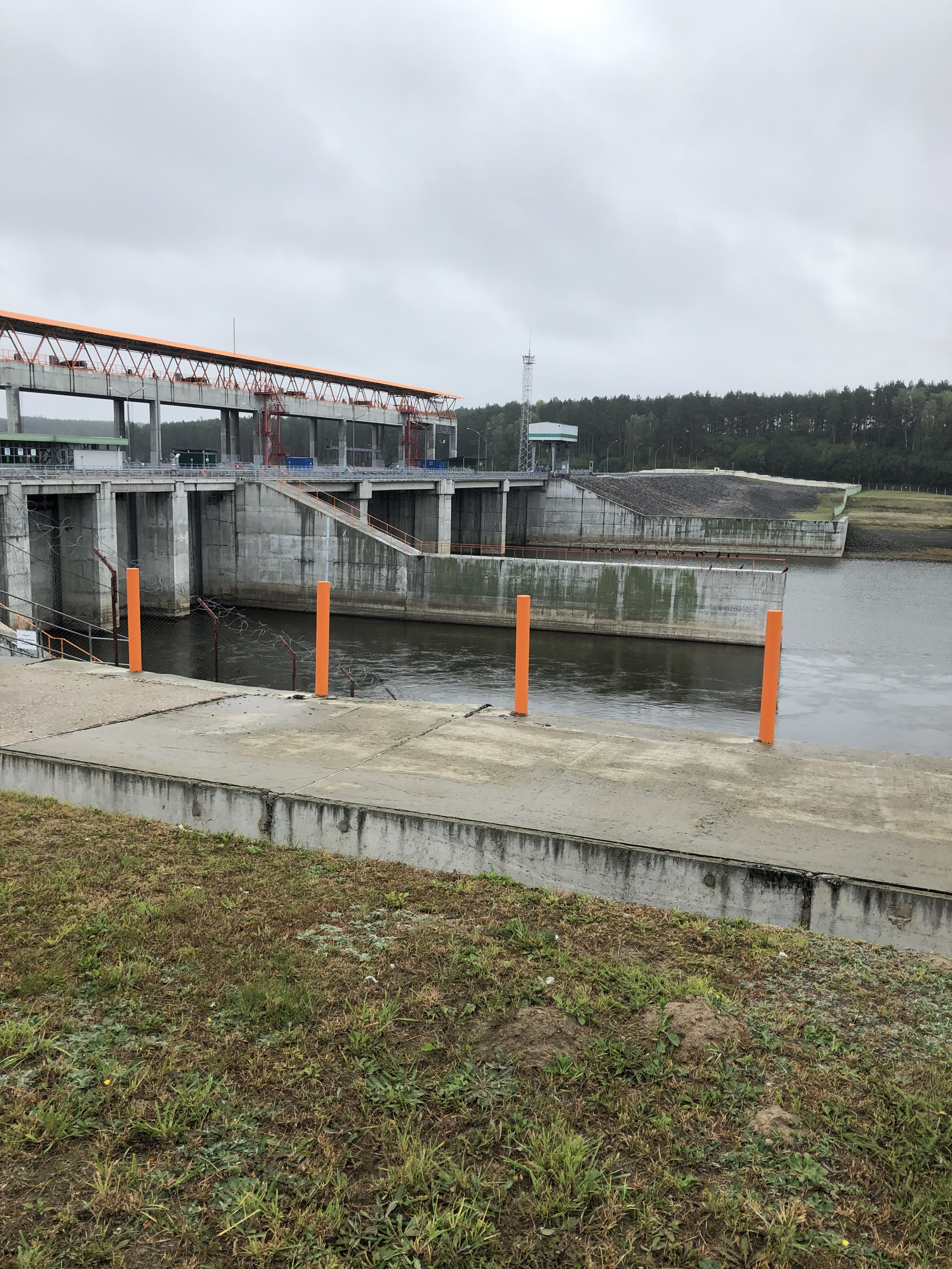 Выгдяд Гродзенскай ГЭС у верасні 2019 года.Беларуская (тарашкевіца): Гарадзенская ГЭС (верасень 2019 року).